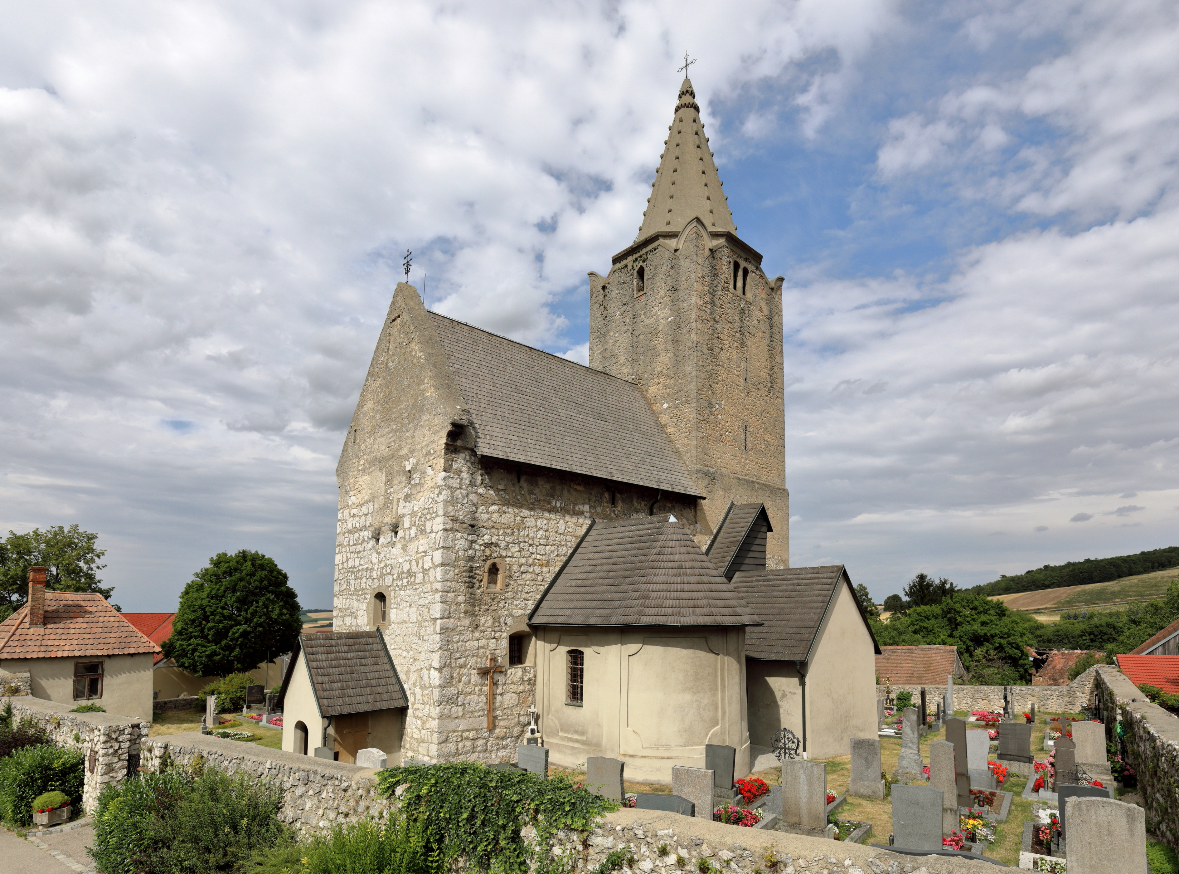 Südwestansicht der röm.-kath. Pfarrkirche hl. Veit in Michelstetten, ein Ortsteil der niederösterreichischen Marktgemeinde Asparn an der Zaya.Die spätromanische Wehrkirche mit frühgotischem Chorturm und eingezogener Rundapsis ist der älteste Kirchenbau im nordöstlichen Weinviertel. Sie ist von einem Friedhof umgeben, dessen Mauer teilweise frühmittelalterlich ist. Das Glockengeschoss des Turmes wurde im 16. Jahrhundert aufgesetzt und die eingeschossige Sakristei an der südlichen Chorturmwand wurde im Spätmittelalter errichtet. Die barocken und rund geschlossenen Kapellen mit Lisenengliederung an der Nord- und Südseite des Langhaus wurden 1752 angebaut.